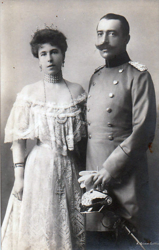 Alexandra Louise Olga Victoria (1878-1942) mit Fürst Ernst (II) von Hohenlohe-Langenburg